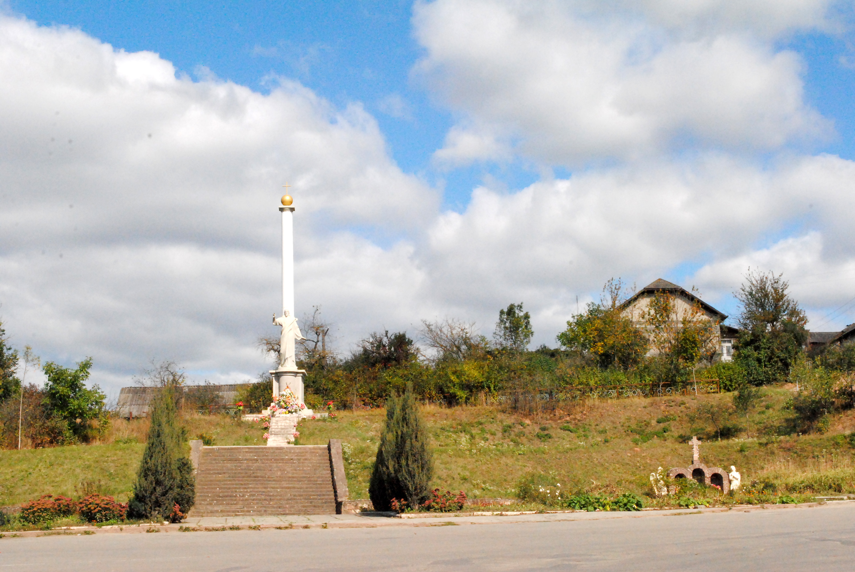 Монумент Христові-Спасителю (Бучач) в Бучачі Тернопільської області на роздоріжжі вулиць генерала Шухевича і Грушевського, т. зв. Чортківському роздоріжжі. Автор — Роман Вільгушинський.